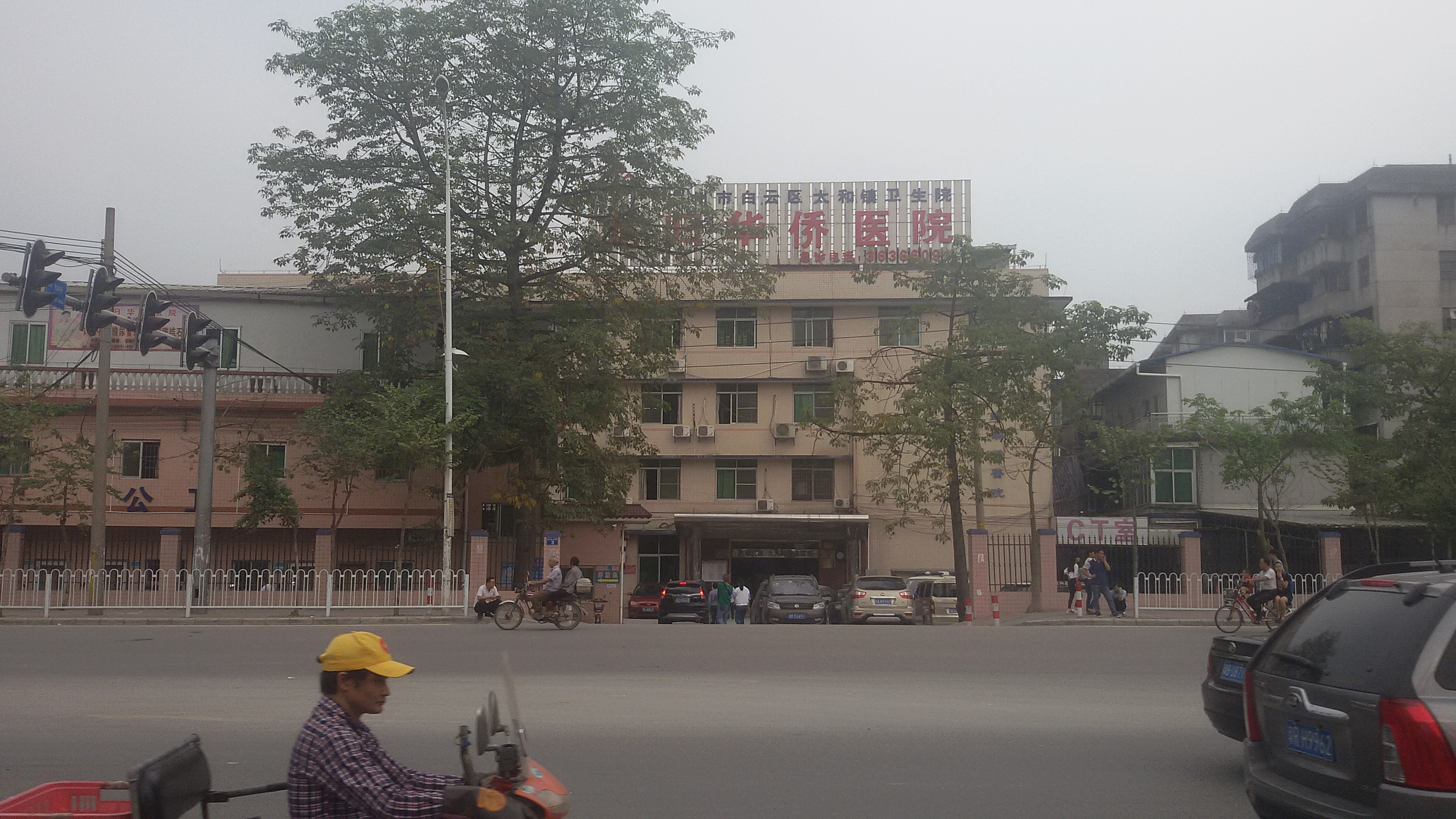 粵語: 龍歸華僑醫院